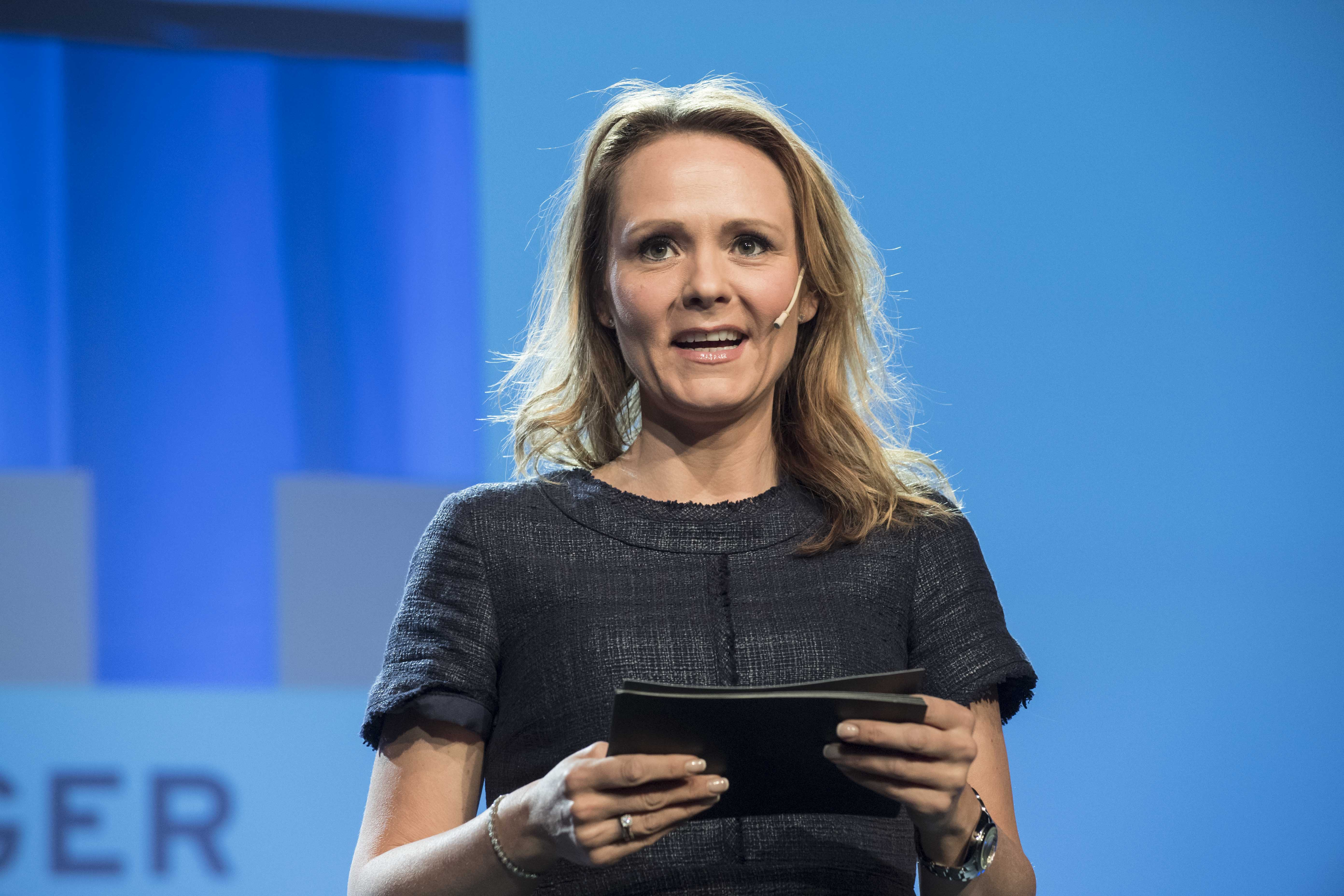 åpning onsdag kveld